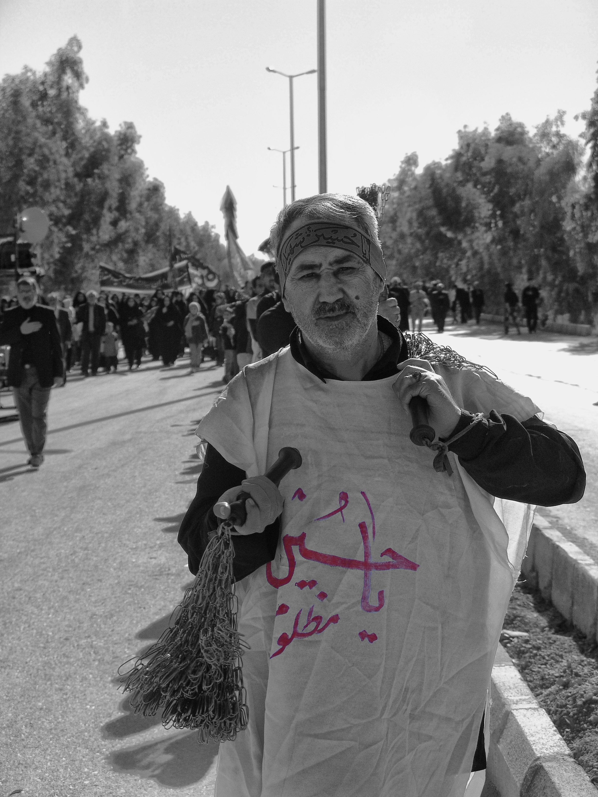 مردی در حال زنجیرزنی در مراسم سوگواری امام حسین در هفتکل، خوزستان، ایران